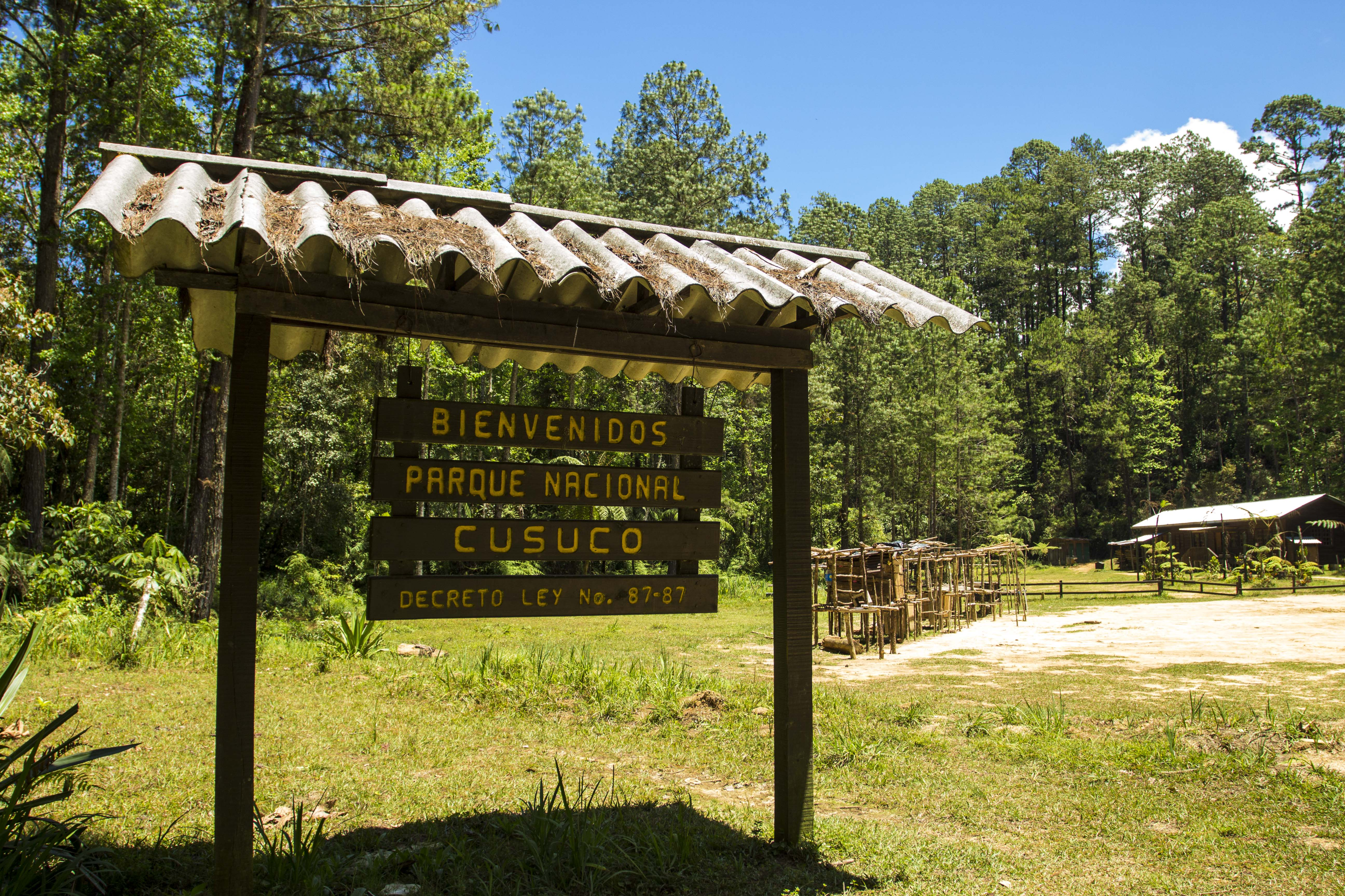 Recon Cusuco, Honduras